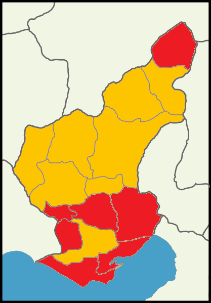 Adana'da 2014 Türkiye cumhurbaşkanlığı seçimi